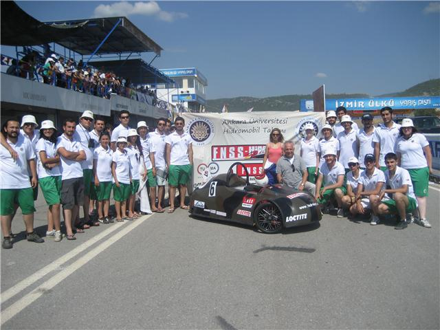 Ankara Üniversitesi Hidromobil Takımı